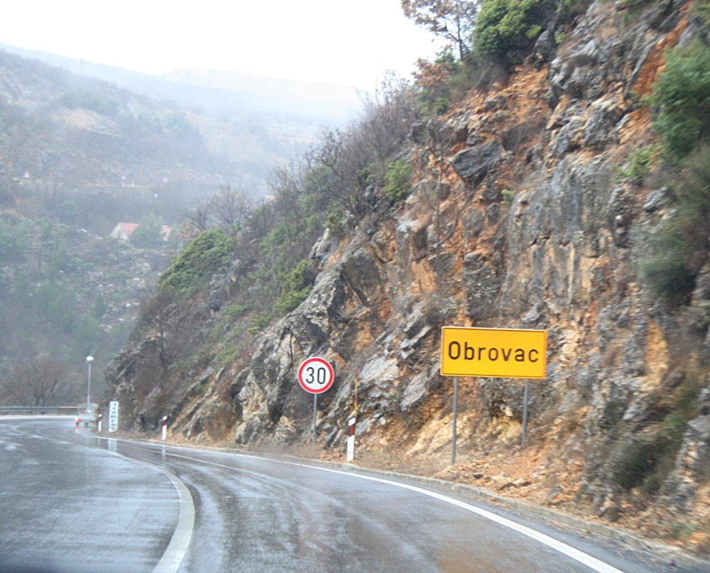 Zagreb_Split